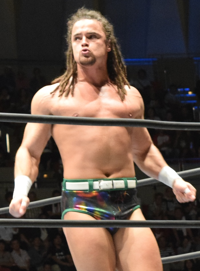 2015年9月27日 ワールド記念ホール「DESTRUCTION in KOBE」 ジュース・ロビンソン